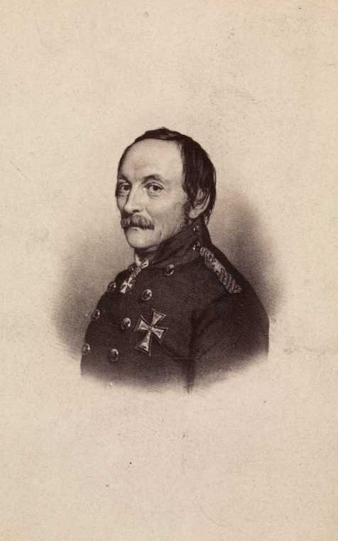 Generalmajor Frederik Adolph Schleppegrell